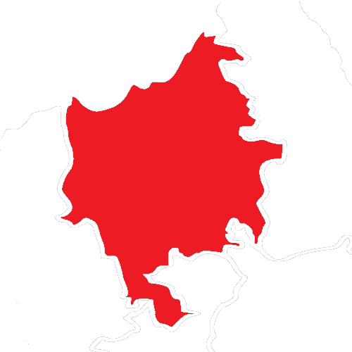 Región Cañada, una de las ocho regiones que conforman al estado mexicano de Oaxaca.